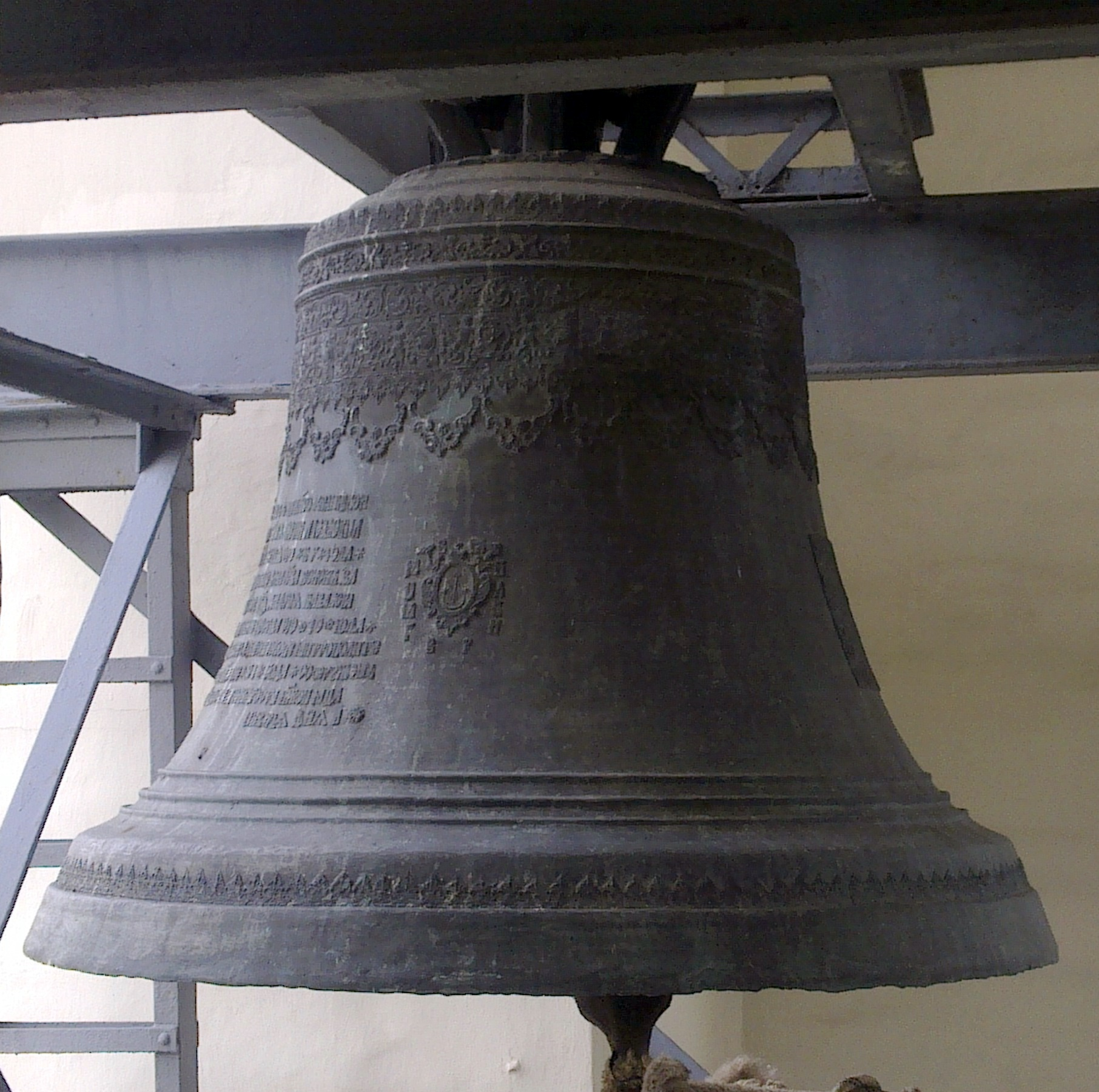 Колокол, изготовленный по заказу гетмана Мазепы и установленный на колокольне Софии Киевской